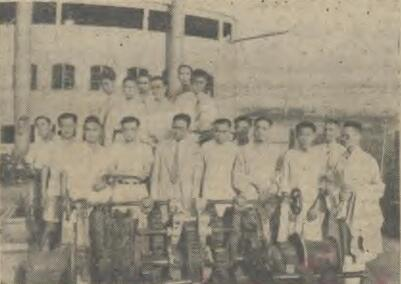 题名： 中華造船廠戰後第一隻新輪，民俗號舉行下水禮（附照片） 作者： 禮華 記 文献来源： 《金声》 出版时间： 1947 年 卷期(页)： [ 第15期 ，2页 ] 中图分类号： G216.3